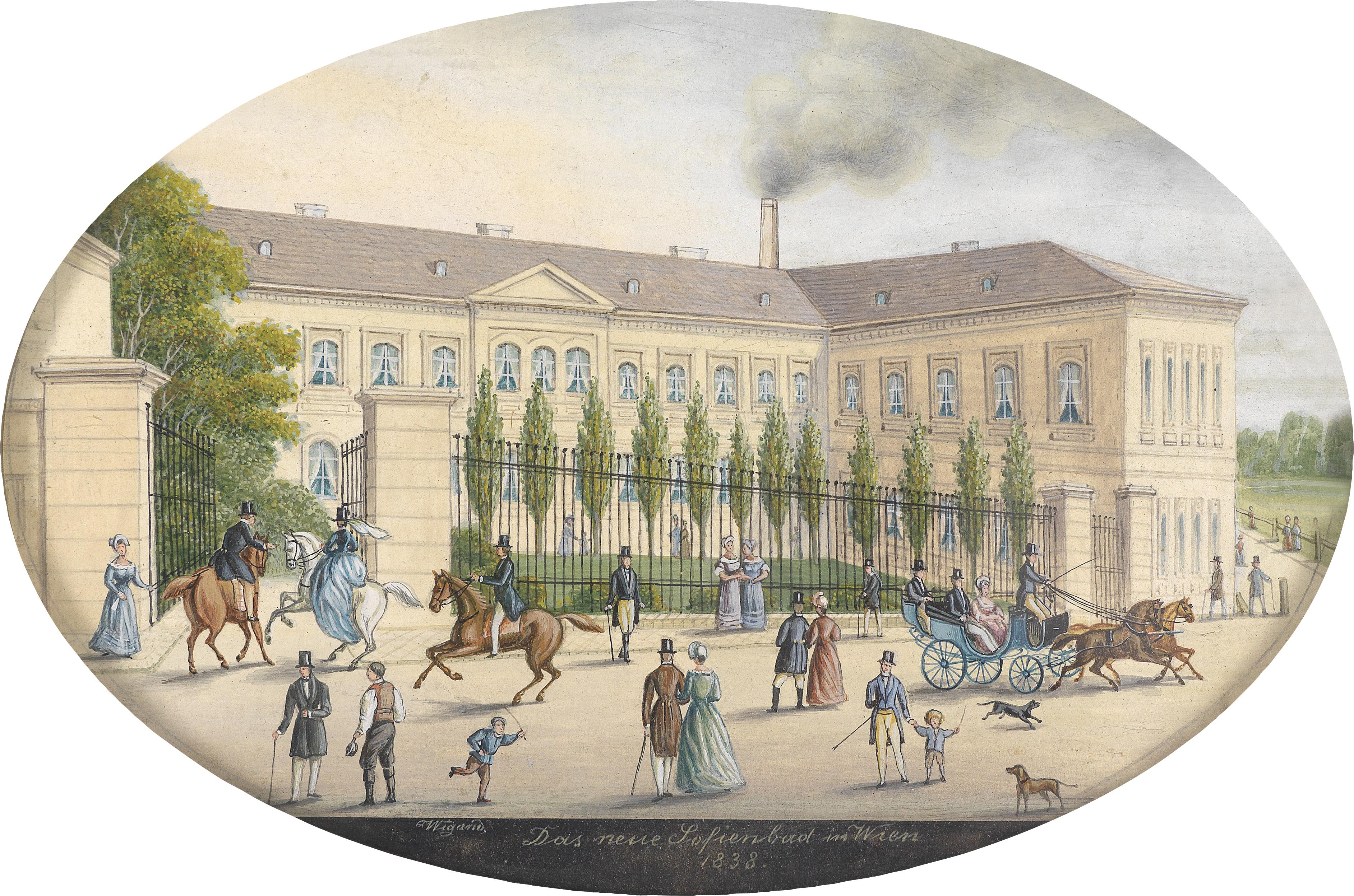 Das neue Sofienbad in Wien